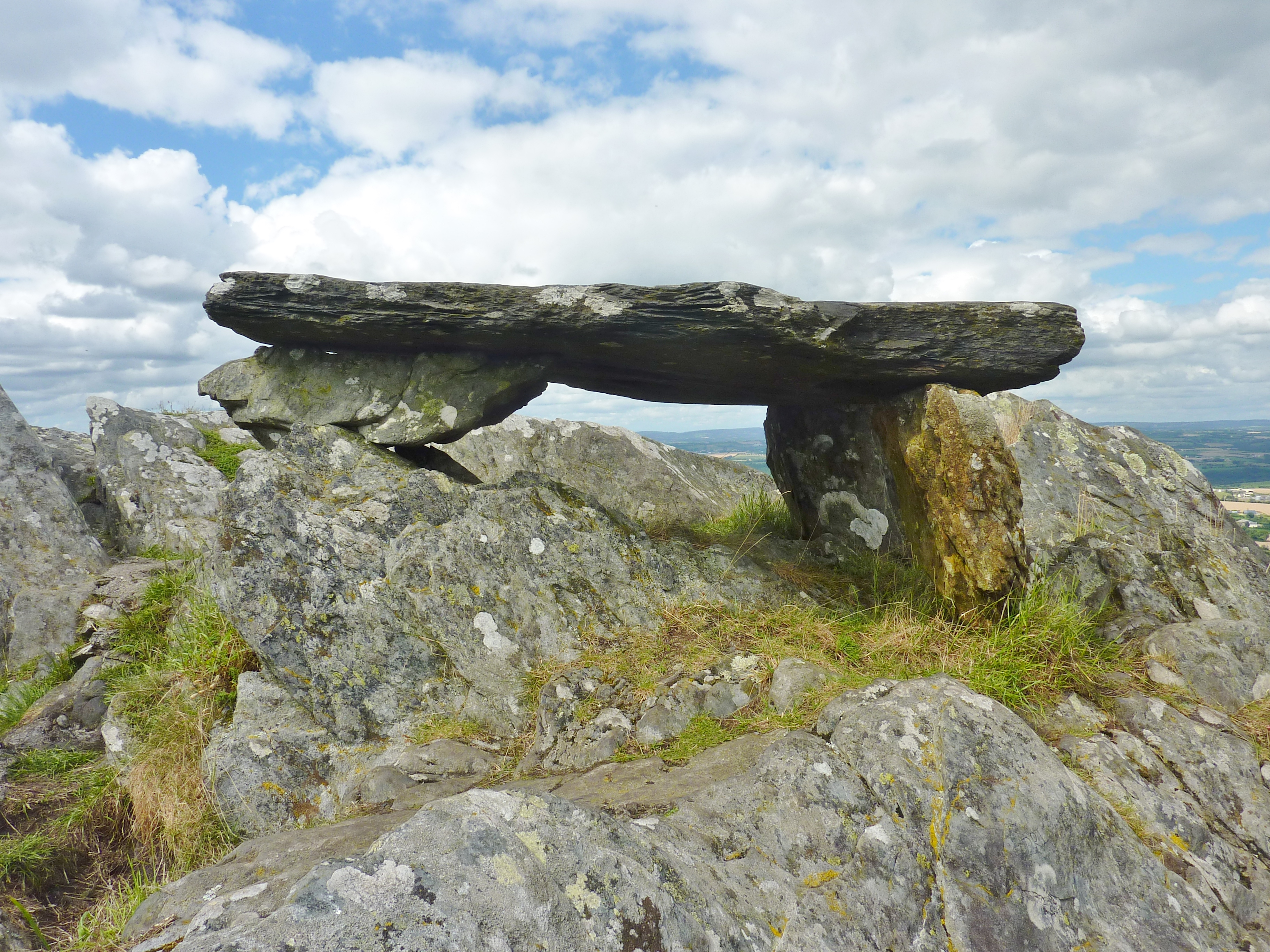 Gouézec : grosse pierre de schiste, faisant penser à un dolmen, reposant sur trois pieds, au sommet de la "Roche-du-Feu" (Karreg-an-Tan), un des sommets des Montagnes Noires. Depuis toujours, les gens gravent sur cette pierre et autour, leur nom ou y font des dessins, ce qui montre bien l'attachement qu'ont les personnes pour cet endroit.